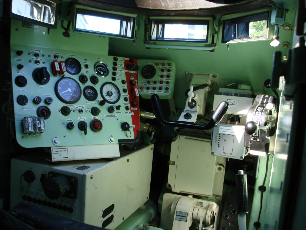 Fahrerplatz eines deutschen M113 mit der Nutzungsdauerverlängerung 2 zur Verlängerung der Nutzungsdauer. Die Umrüstung umfasste neben dem Fahrerstand, Motor, Lenkschaltgetriebe und Kette.